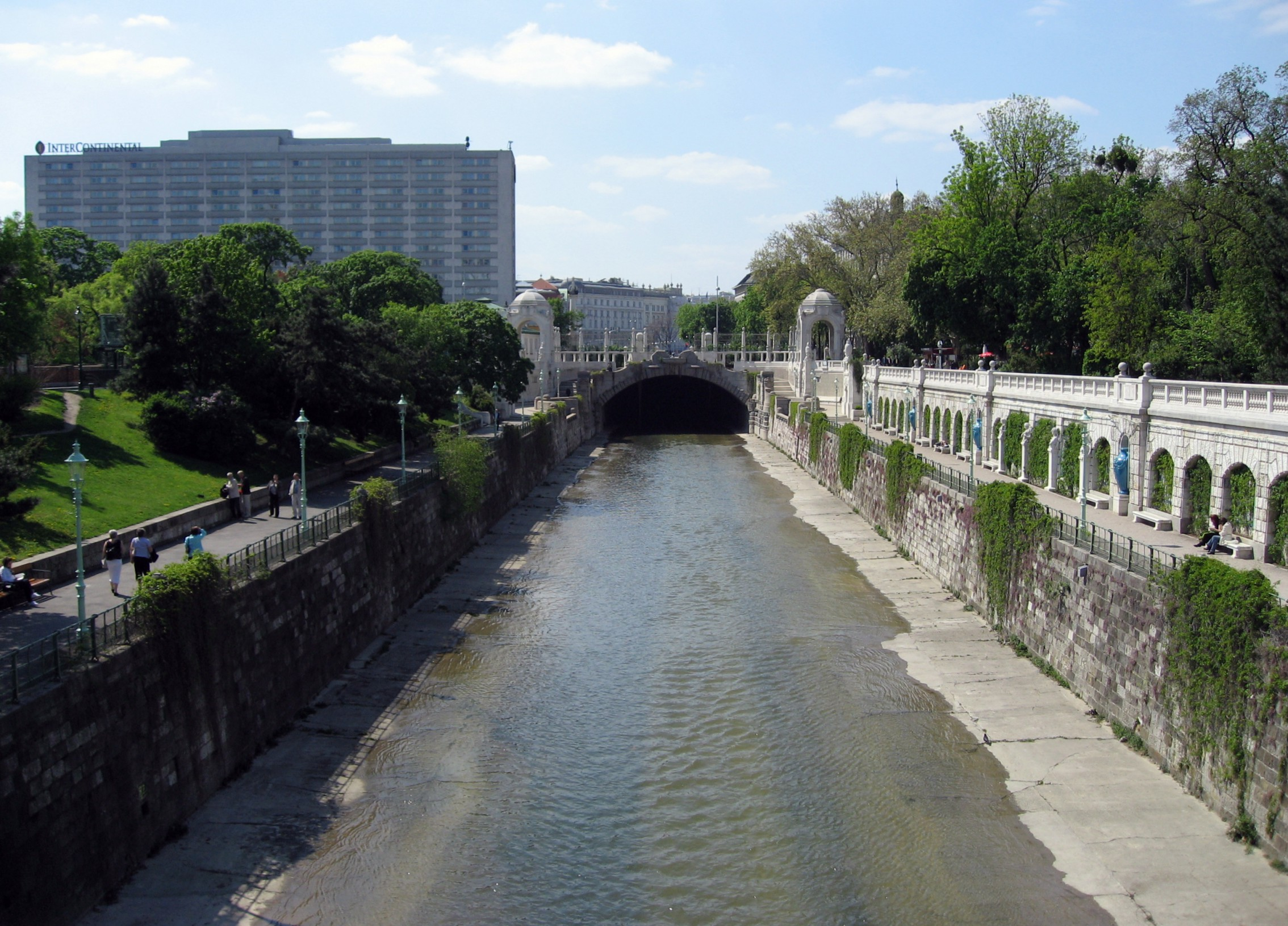 Wien Stadtpark Wienfluss flussaufwärts. Hinten rechts das Hotel InterContinental.